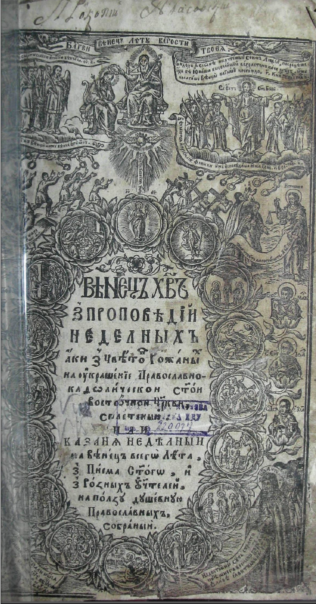 Антоний Радивиловский. Венец Христов, з проповедей неделных, аки з цветов рожаных, на украшение православно-кафолической святой восточной церкви, сплетеный, или казания недельные... – К.: Тип. Киево-Печерской лавры, 1688.